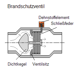 Brandschutzventil